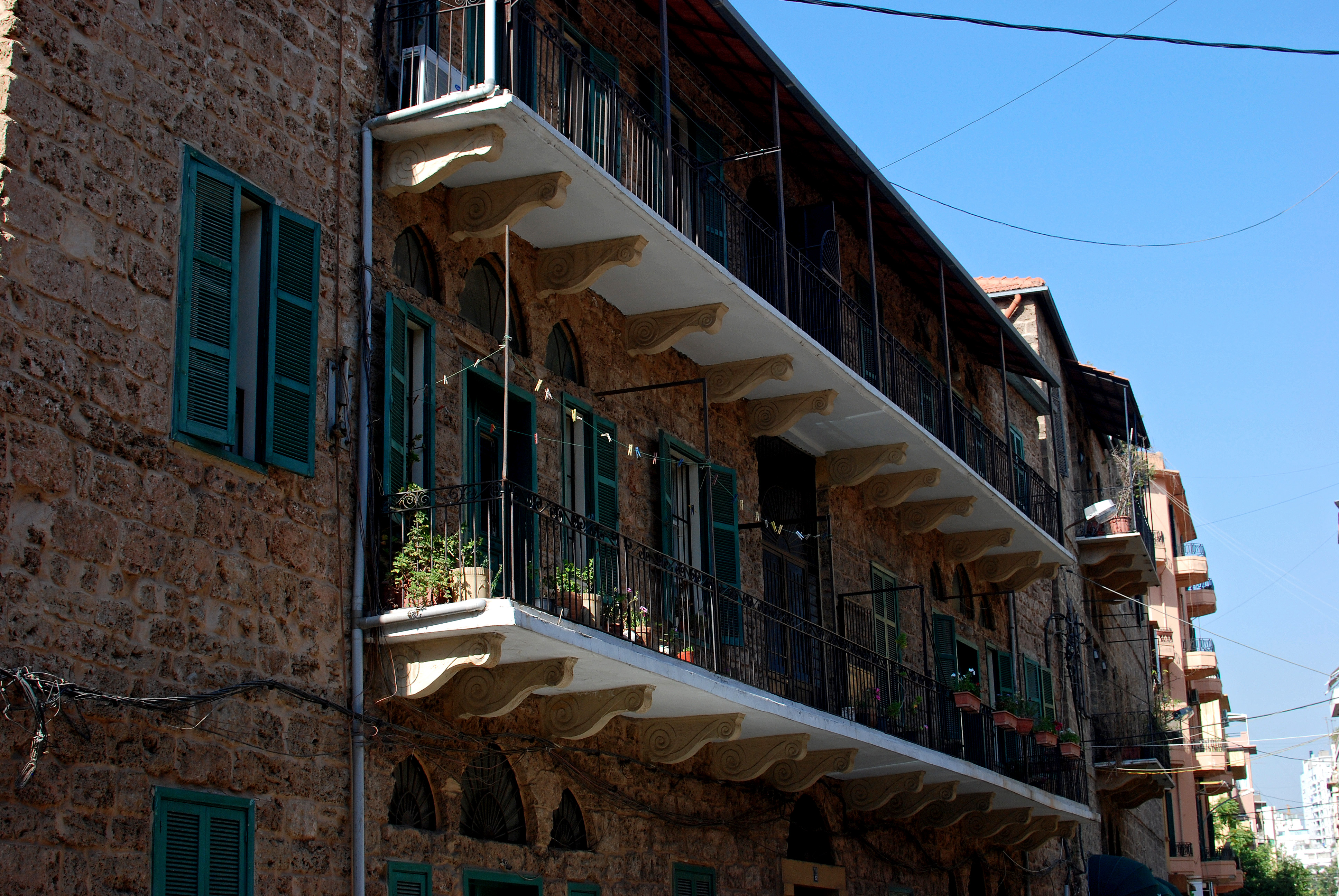 beirut, lebanon.